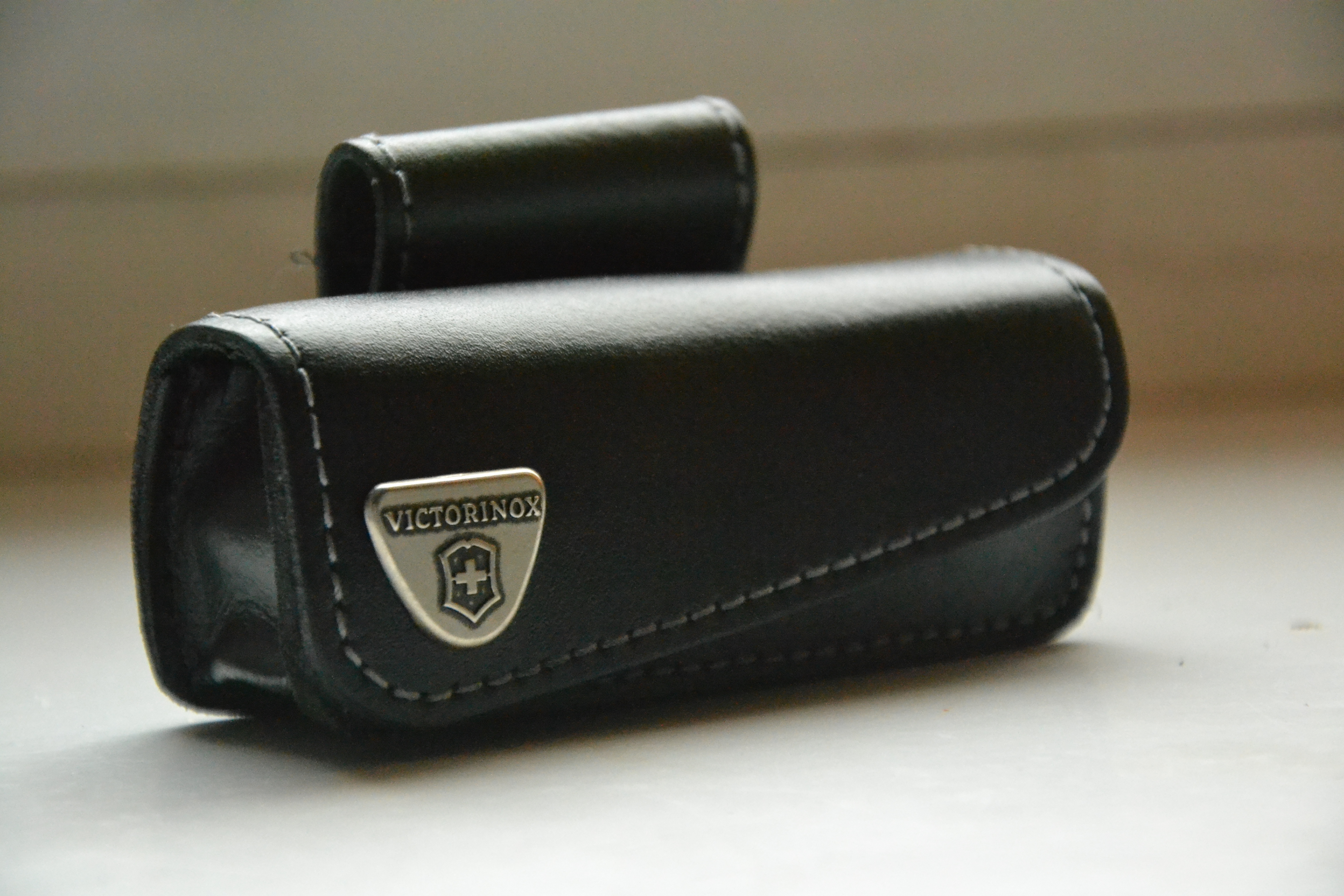 Victorinox pokrowiec do scyzoryków 91 mm